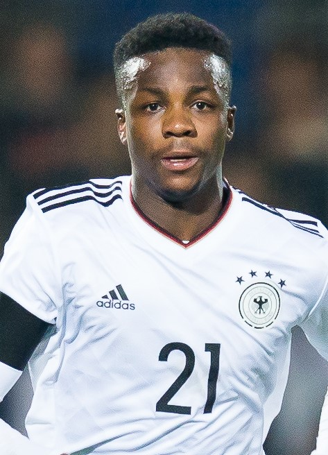 Gideon Jung beim U-21-Länderspiel zwischen Deutschland und England am 24. März 2017.